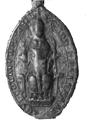 Hontpázmány nb. János kalocsai érsek pecsétje, 1291